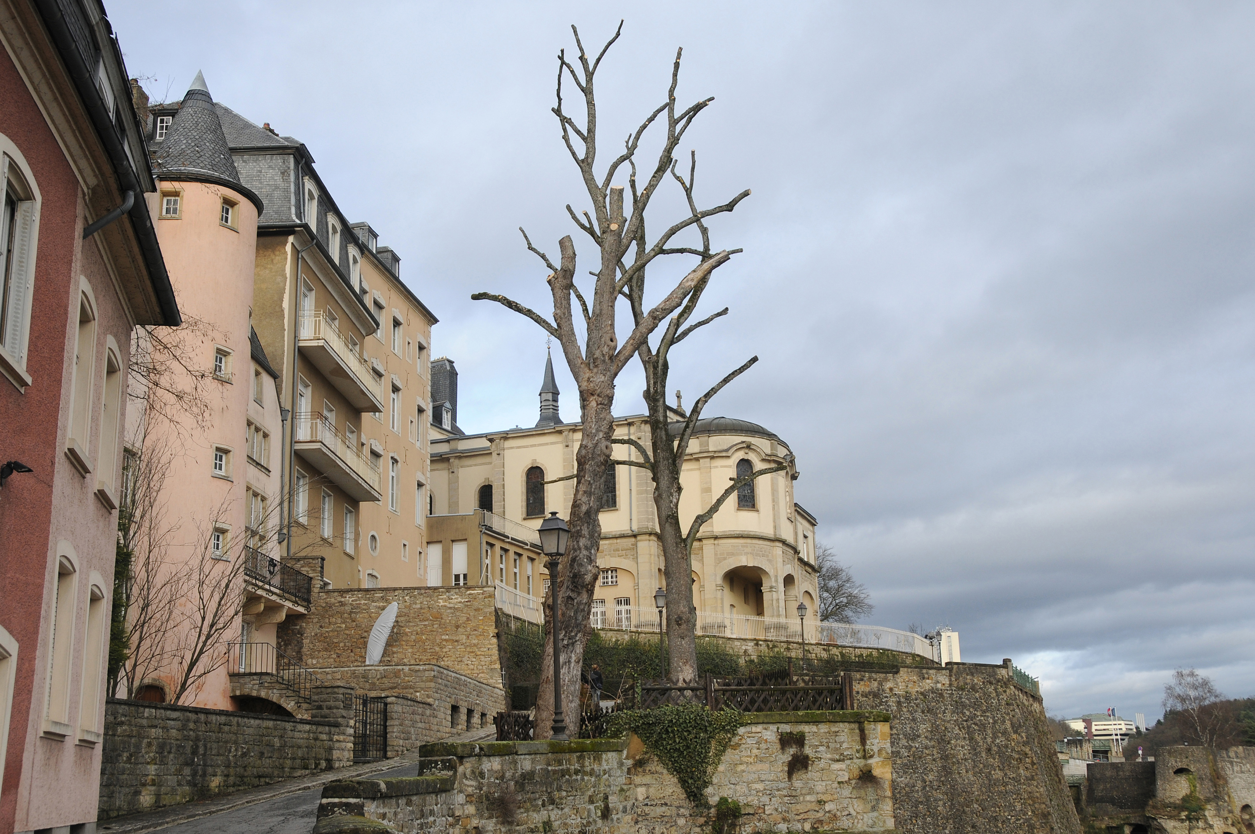 Biergahornen op der Corniche. Biergahornen